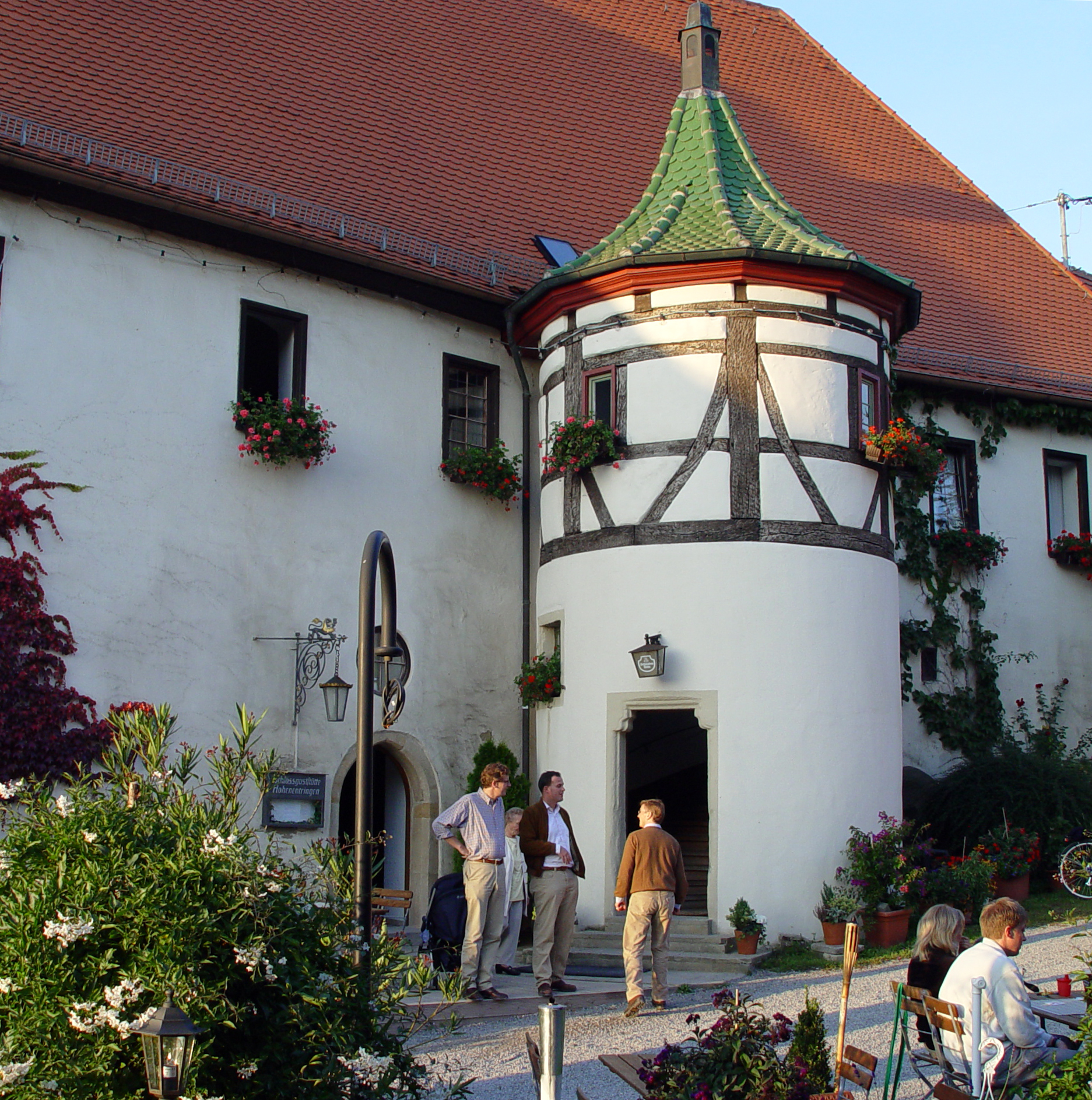 Hohenentringen. Eingang zur Gaststätte.